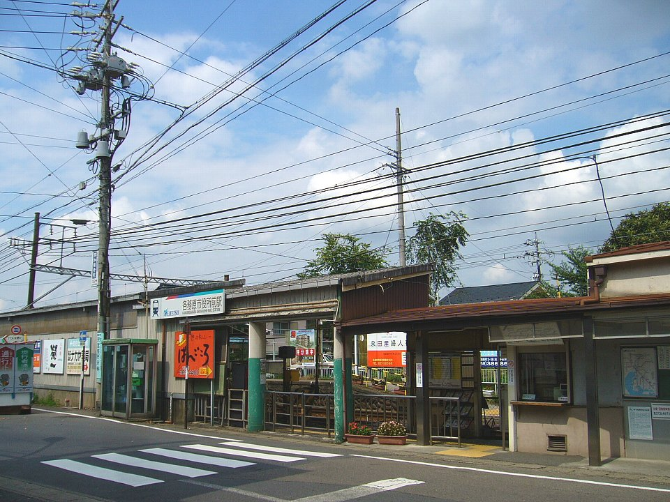 名鉄各務原線各務原市役所前駅 駅舎